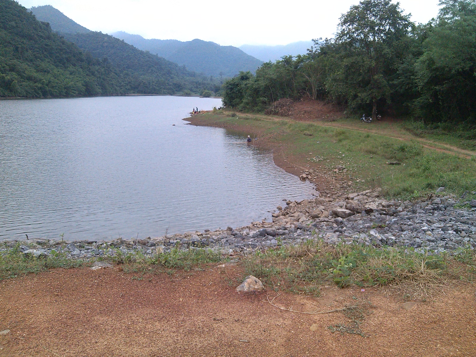 Pa Deng, Kaeng Krachan District, Phetchaburi, Thailand